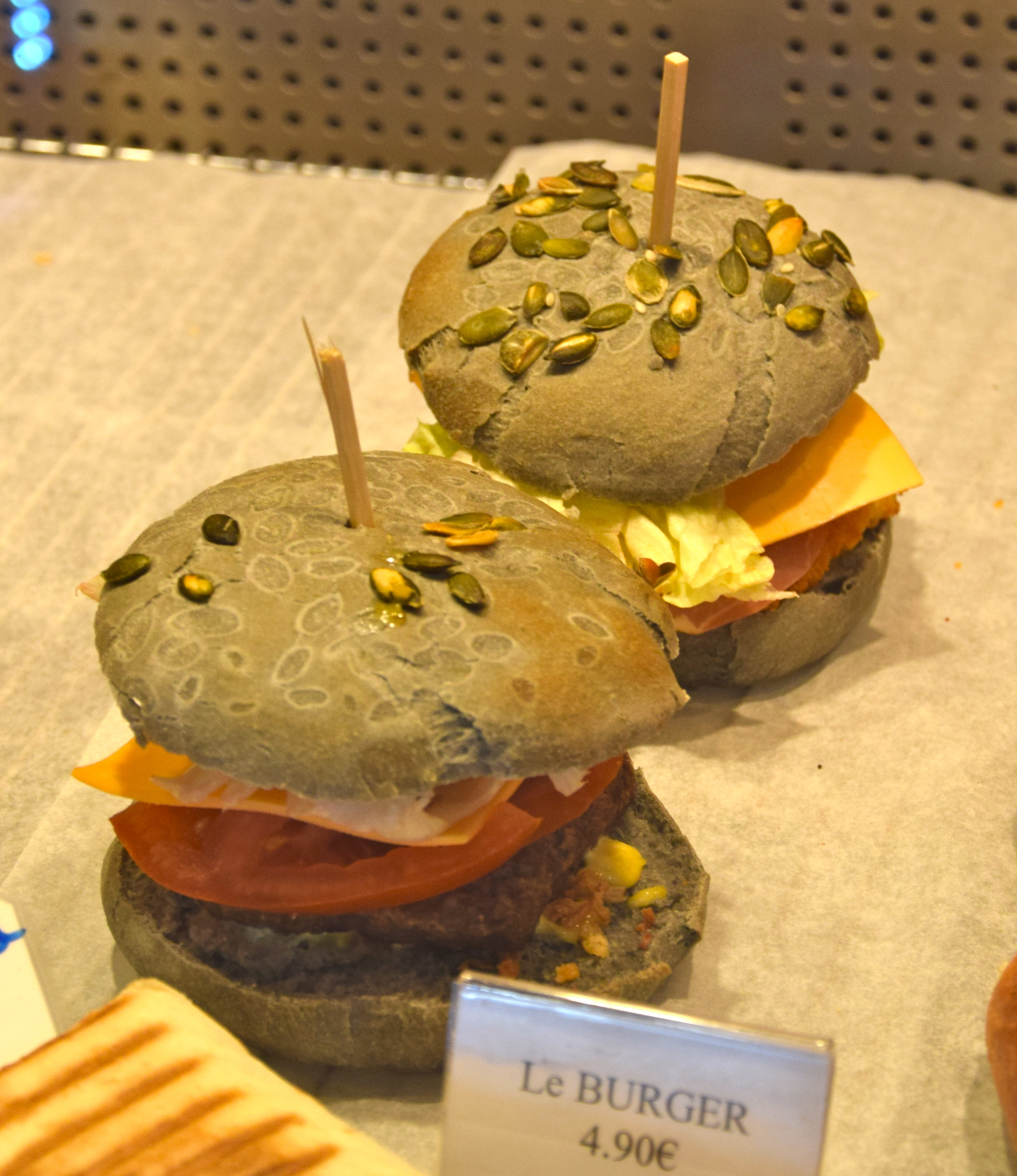 burger fait avec du pain à base de charbon alimentaire